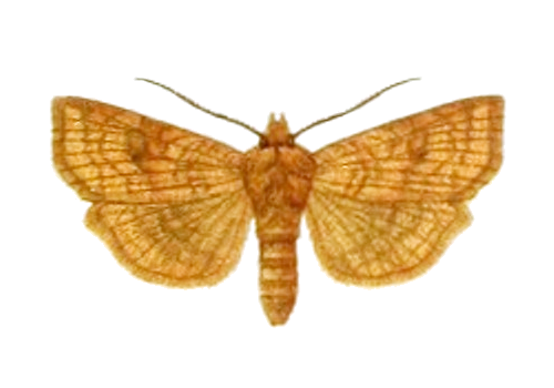 Xestia ochreago Hbn. = Xestia ochreago (Hübner, 1790)